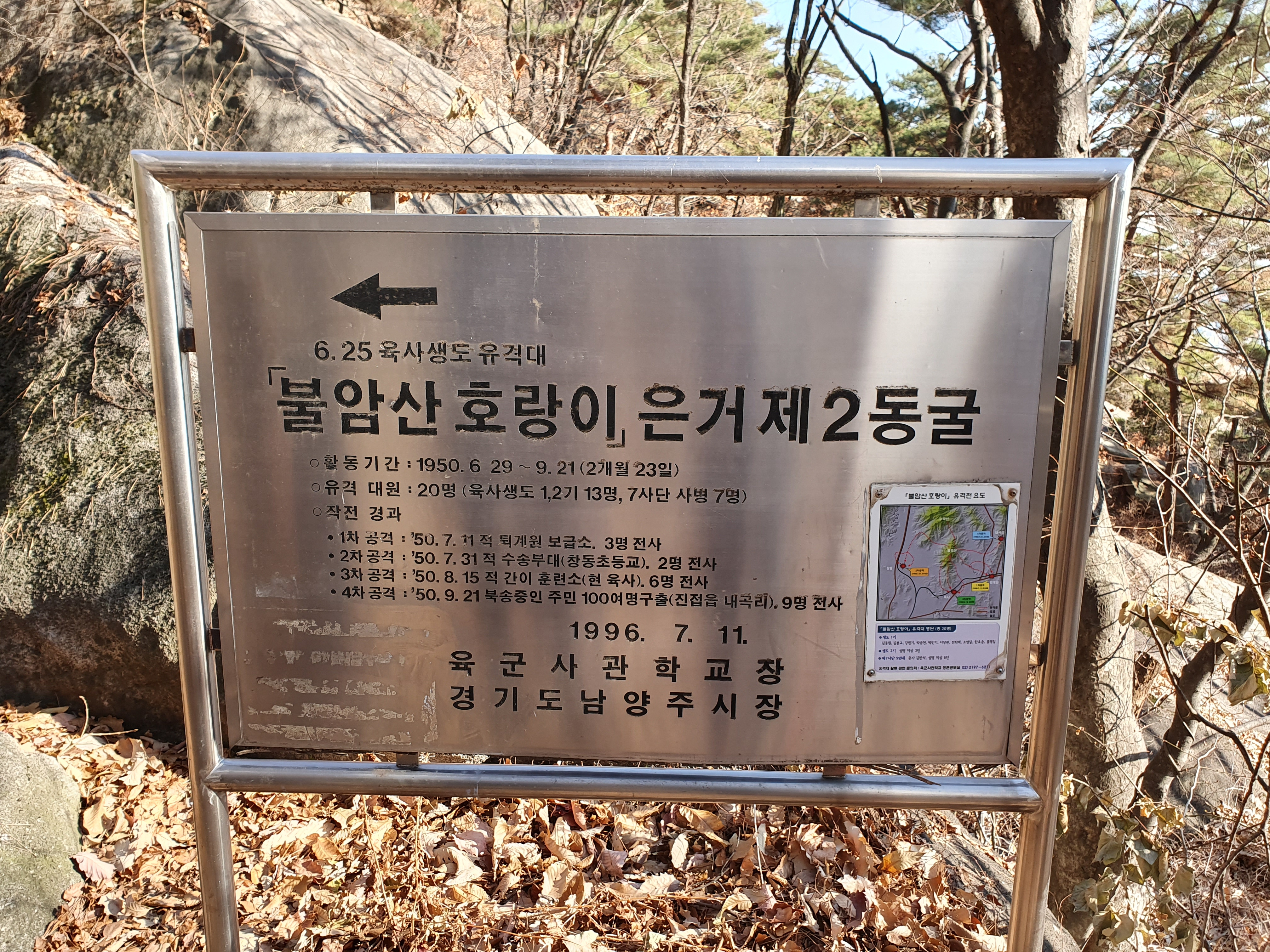 불암산 호랑이 유격대 제 2동굴